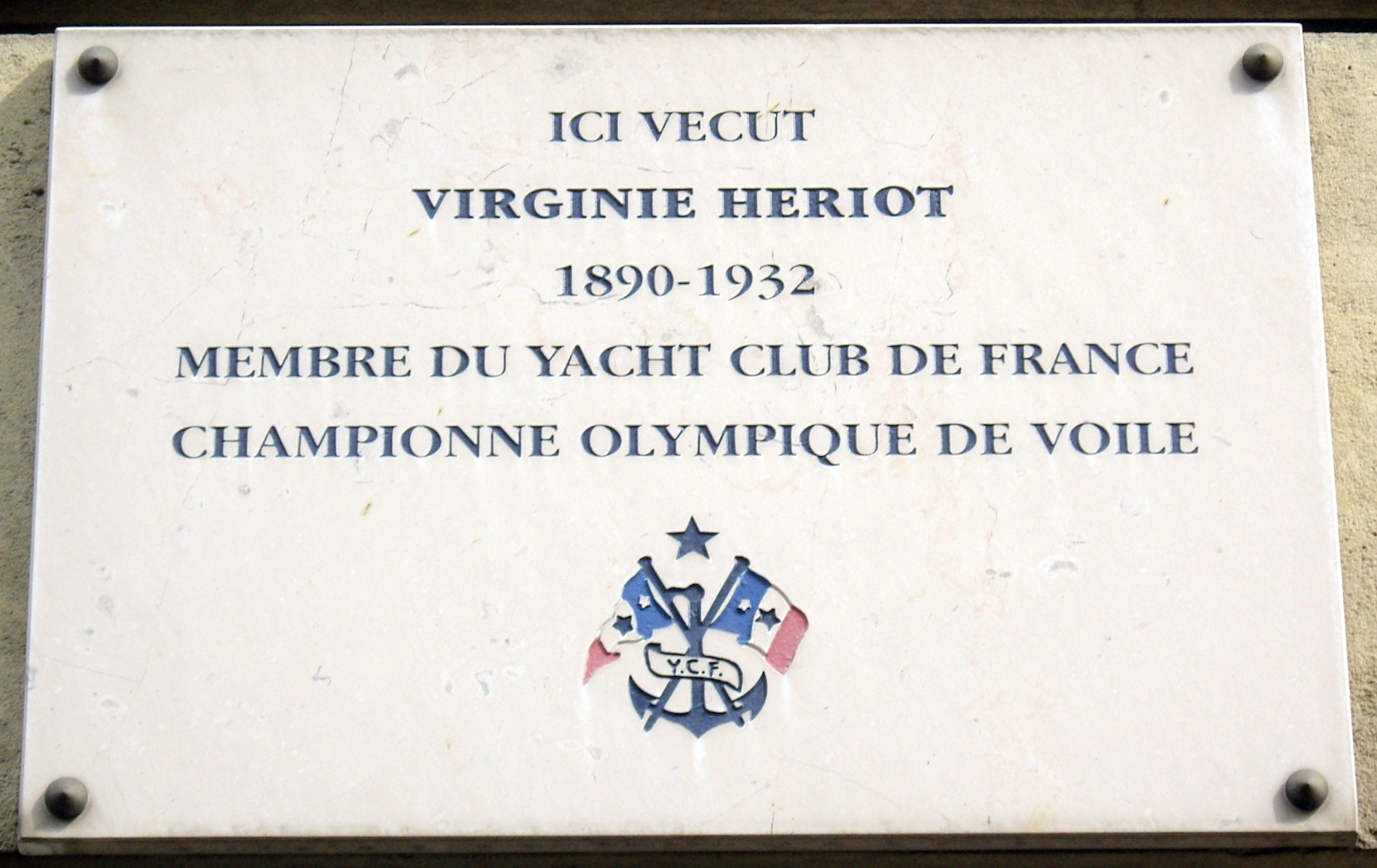 Plaque apposée au n° 54 de la rue de Varenne, Paris 7e, où habita la navigatrice et championne olympique Virginie Hériot (1890-1932).